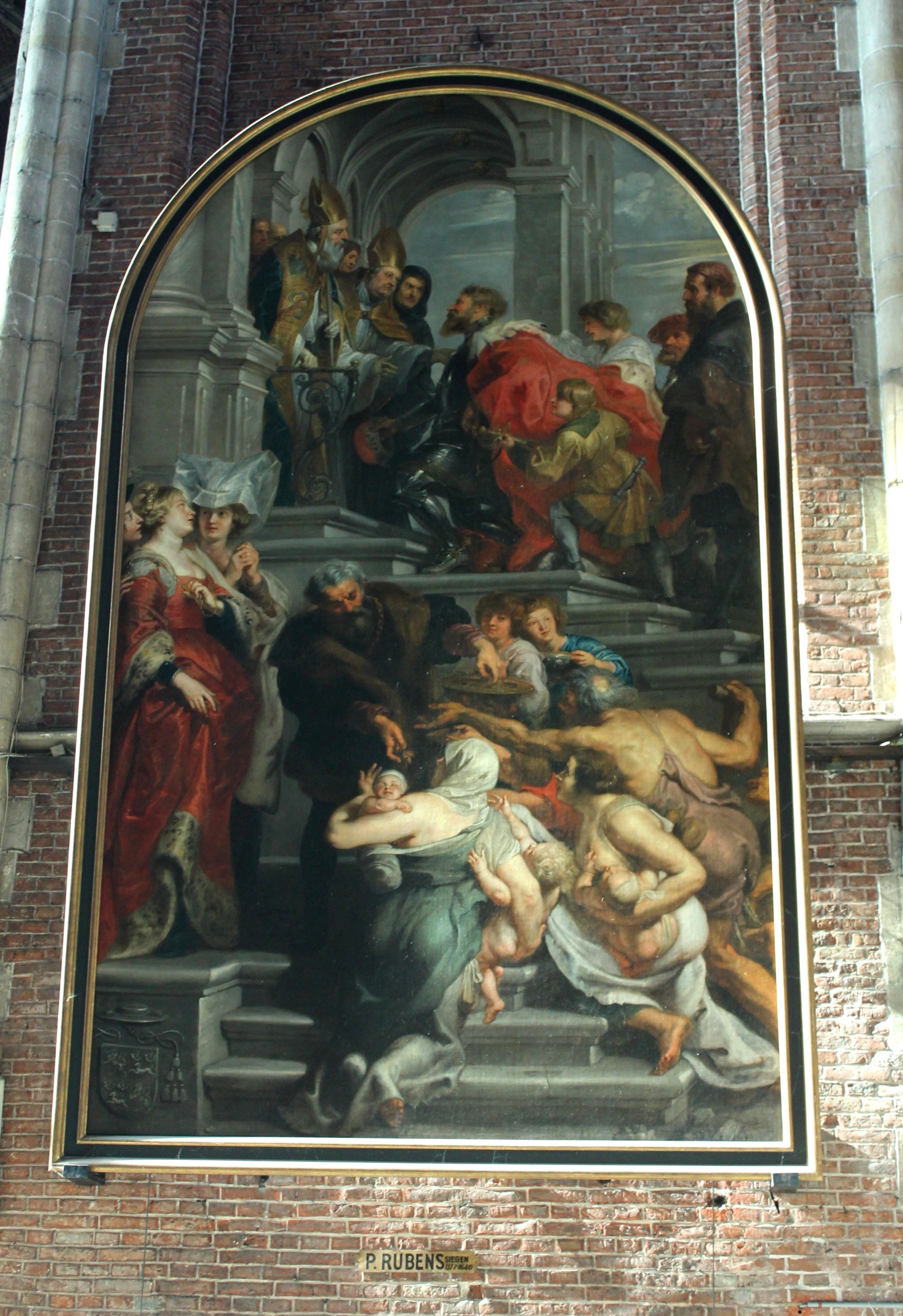 Toile de Rubens (L' Entrée de Saint Bavon au monastère, 1623) Cathédrale Saint-Bavon- Gand- Belgique